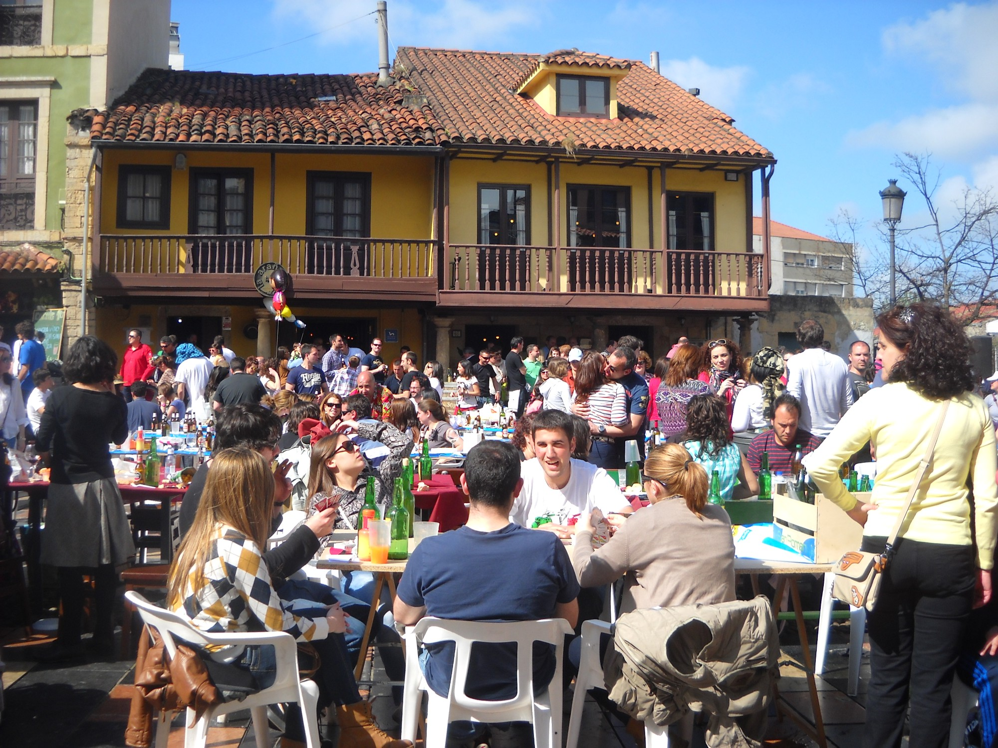 Fiesta del Bollo de Avilés, Asturias